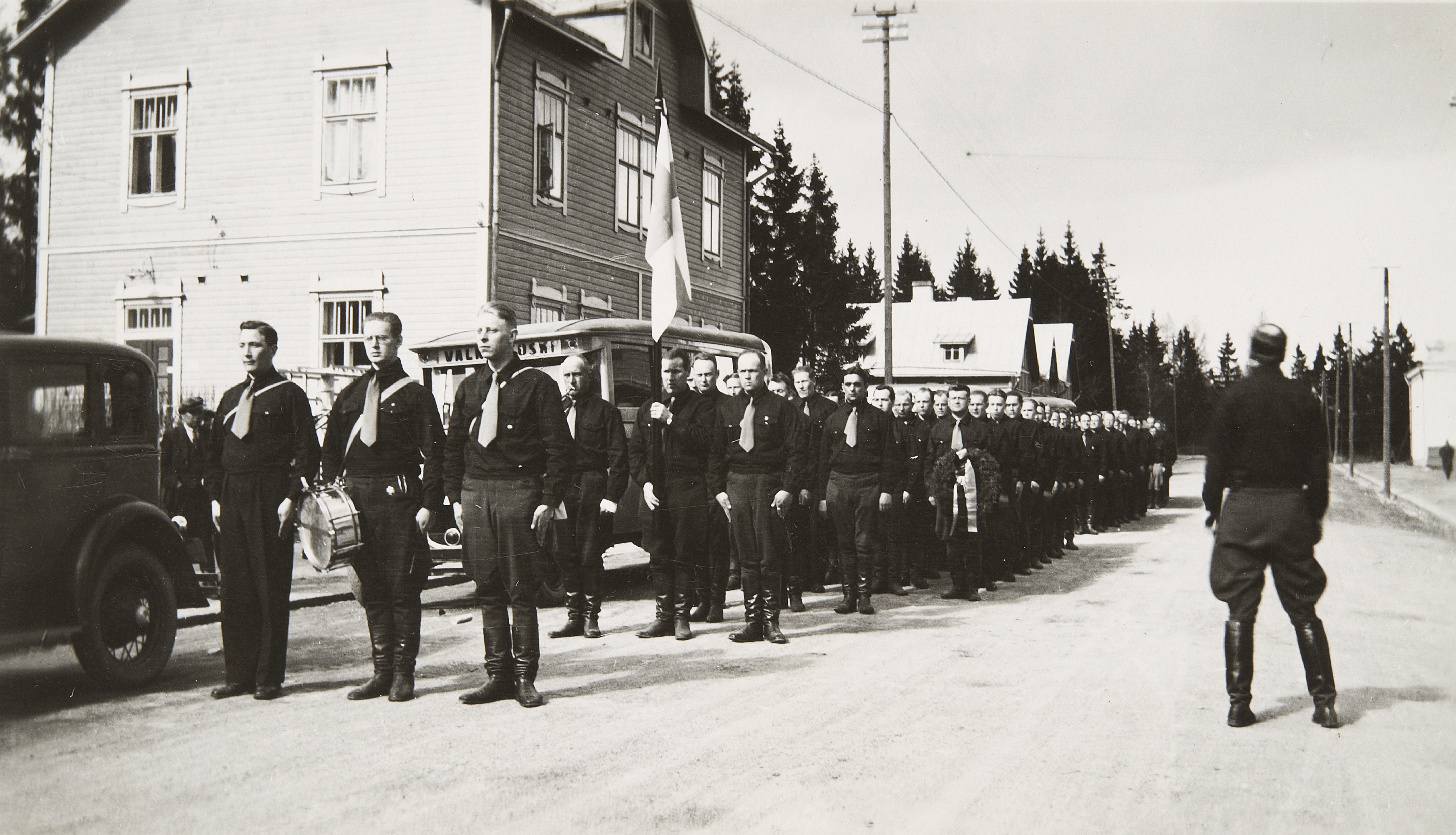 Isänmaallisen Kansanliikkeen kurssi Riihimäellä vuonna 1933, selin kameraan Paavo Susitaival